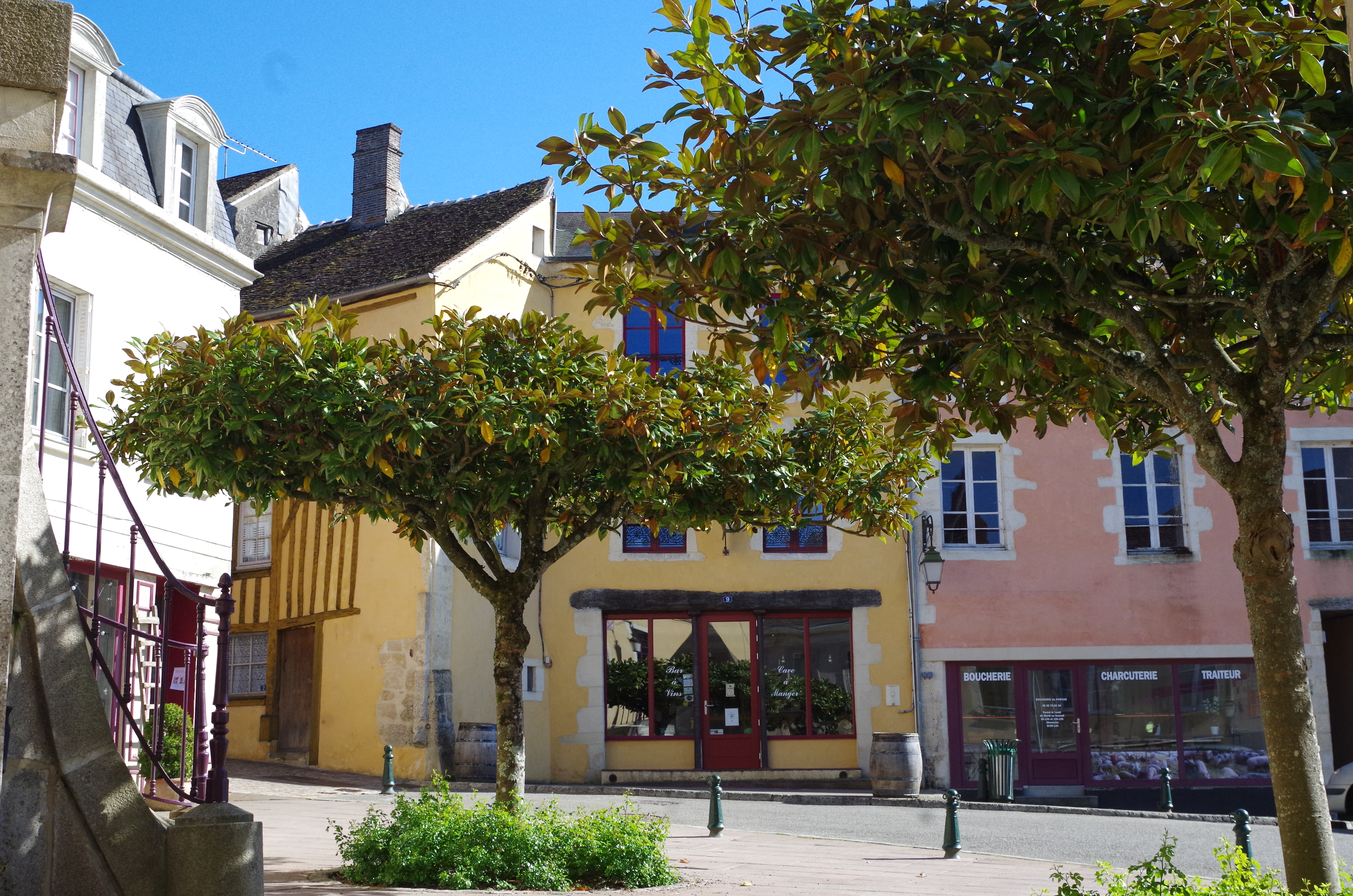 Maisons aux façades colorées de la cité médiévale de bellême